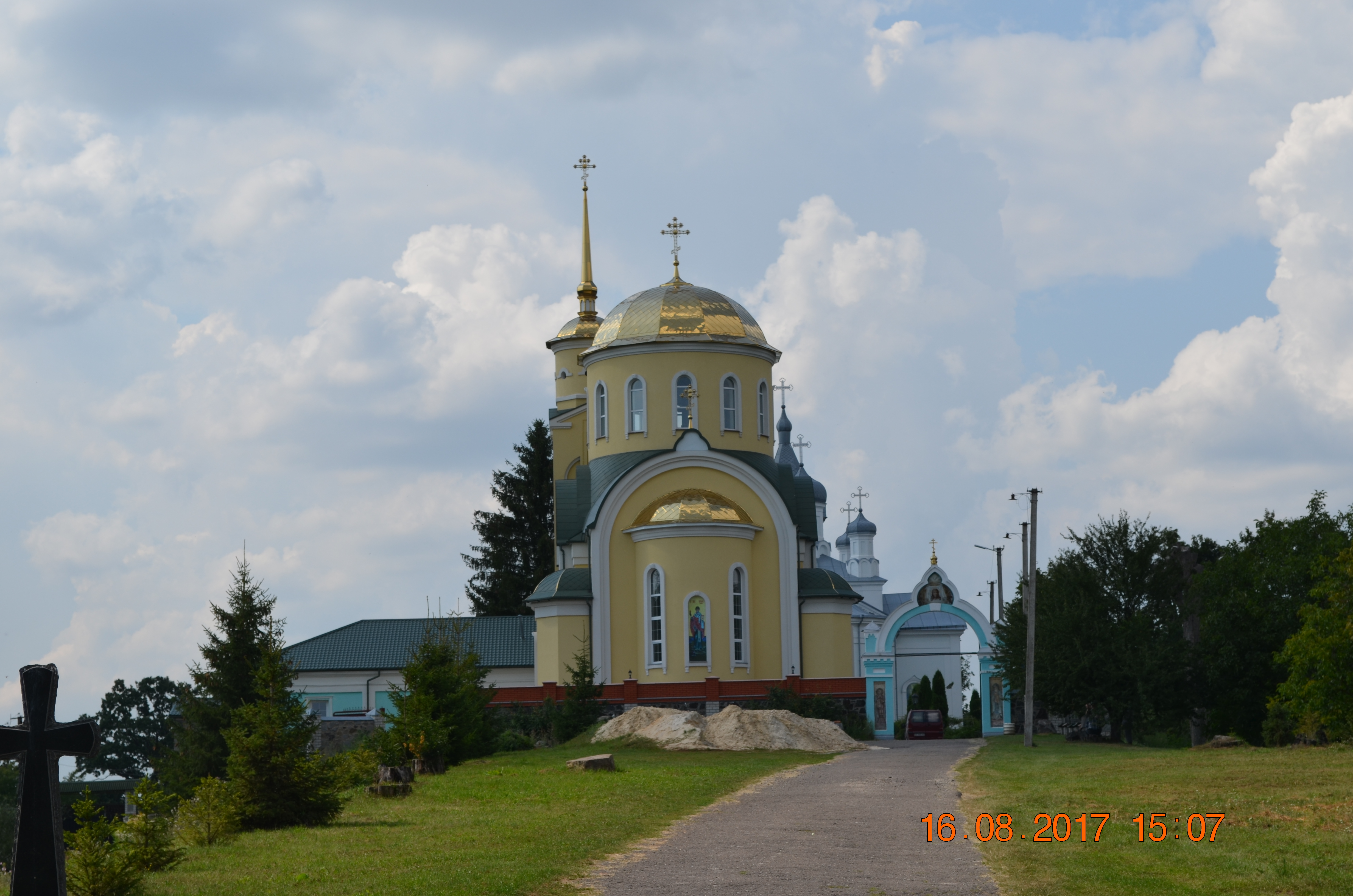 Тригірський Троїцький монастир (мур.):, с.Тригір'я